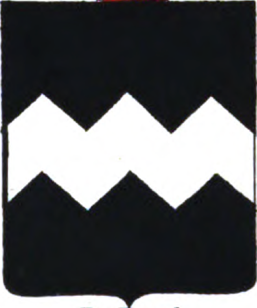 De sable, à la fasce vivrée d'argent.